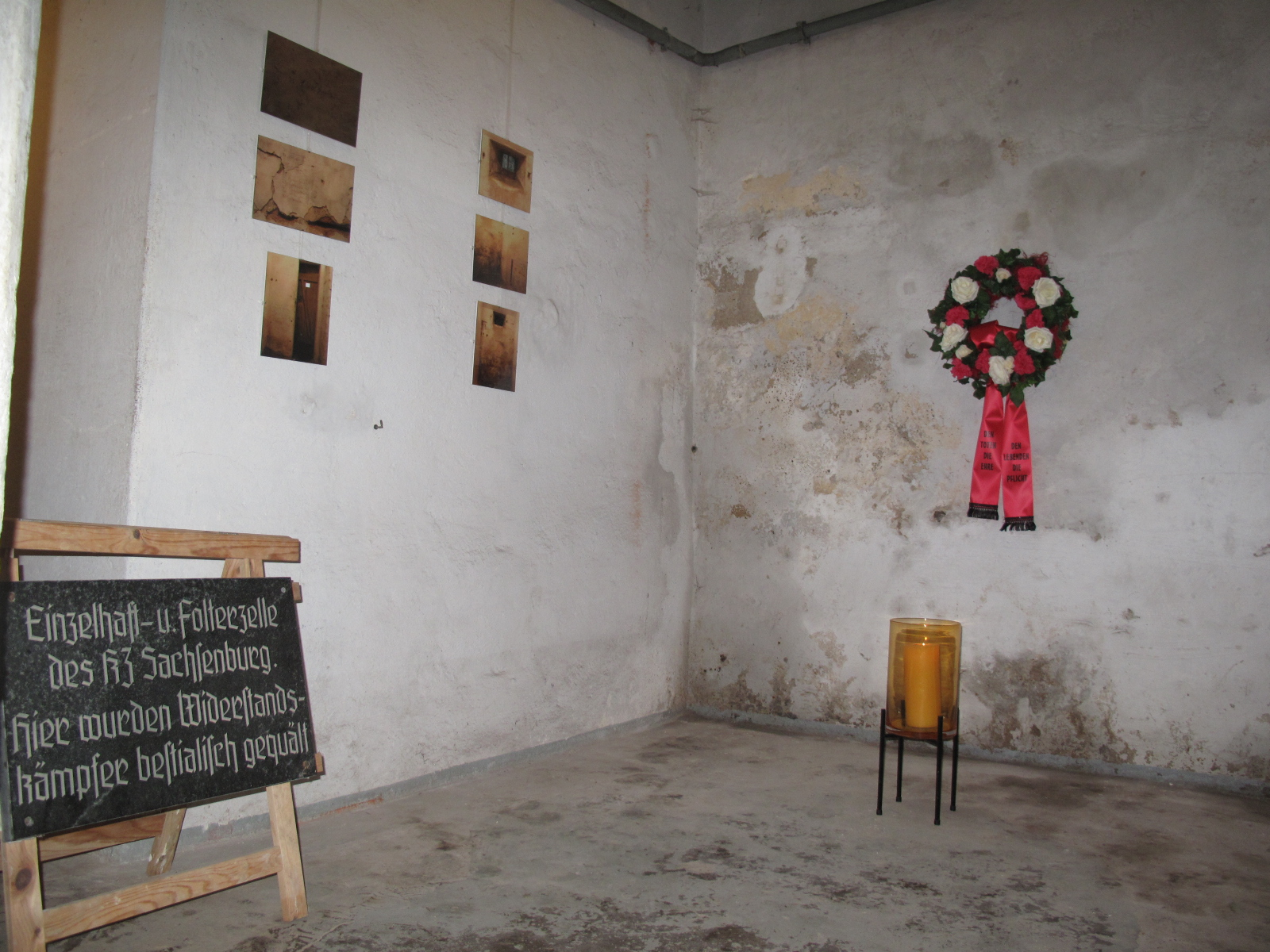 Der Gedenkraum befindet sich ummittelbar vor den vier erhalten Zellen.